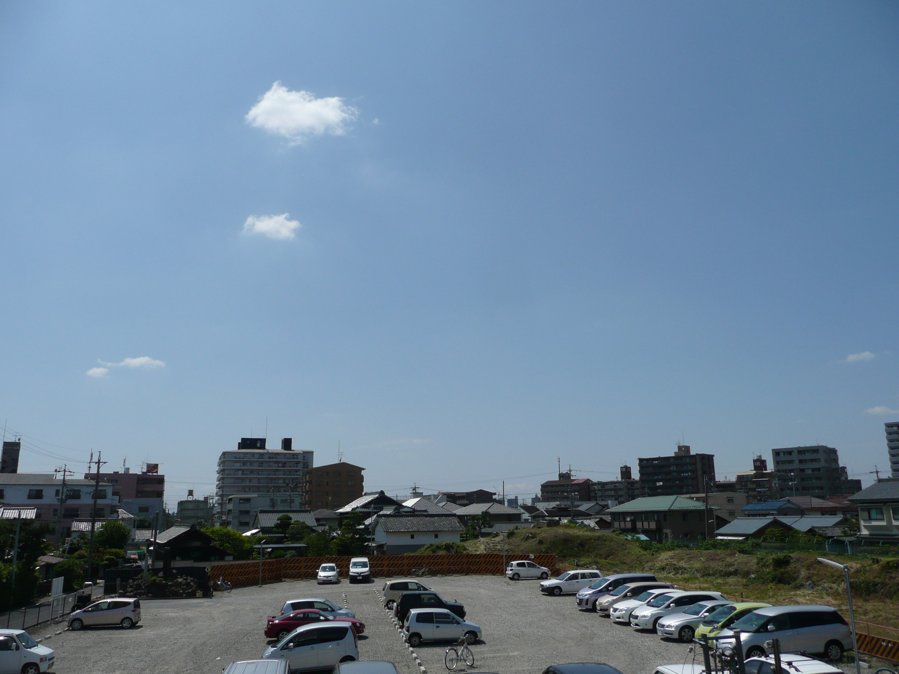 上条城の本丸跡。